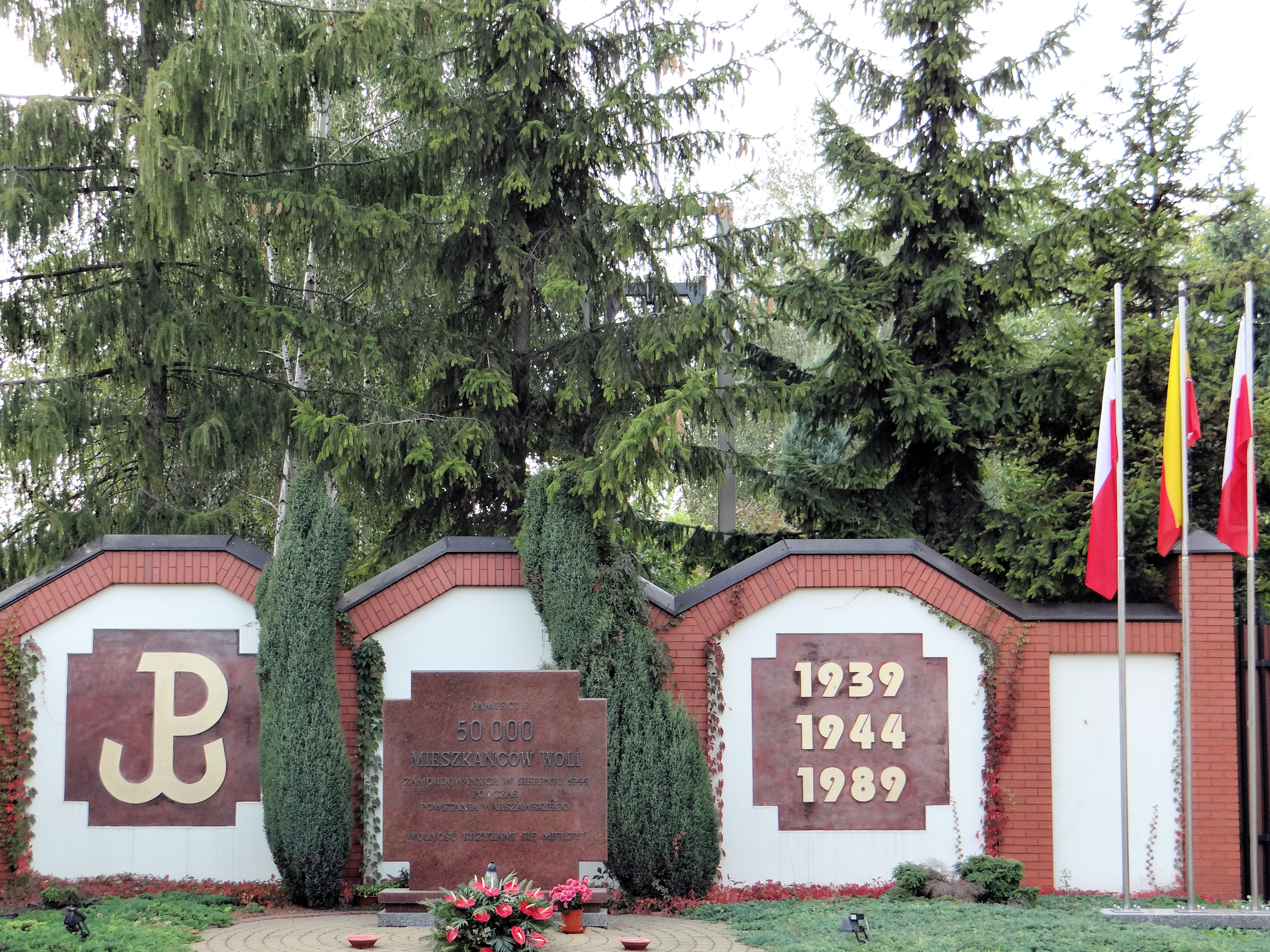 Kościół pod wezwaniem św Klemensa Hofbauera w Warszawie na Woli, przy ul. Karolkowej 49 - plac pamięci - tablice upamiętniająca ofiary II Wojny światowej - 1939, Powstania Warszawskiego i współczesne